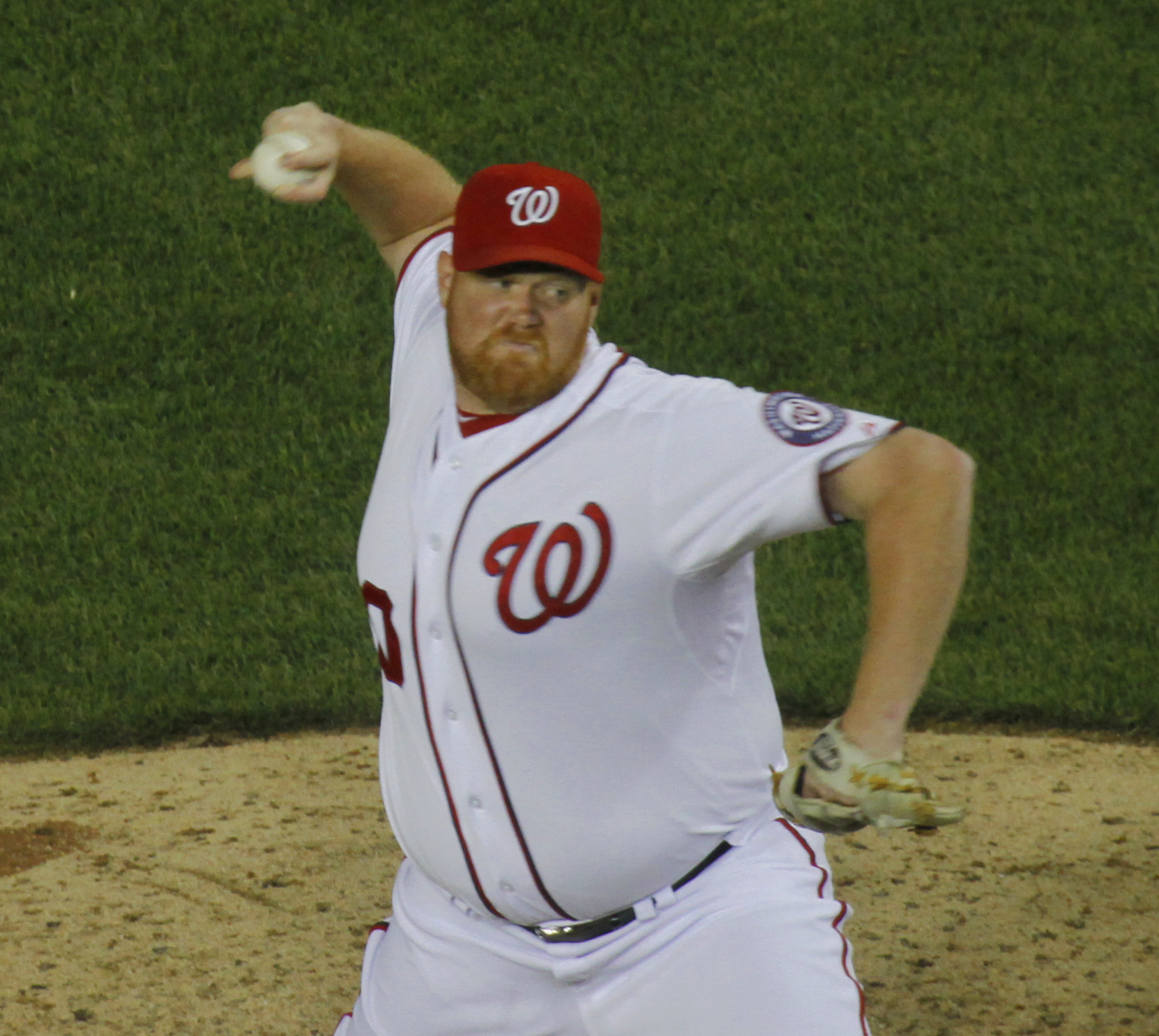 Todd Coffey